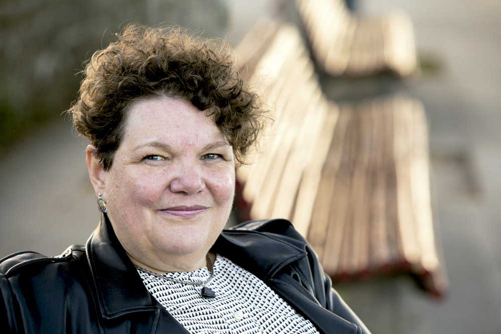 Inma Errea iruindar itzultzailea, 2017an.